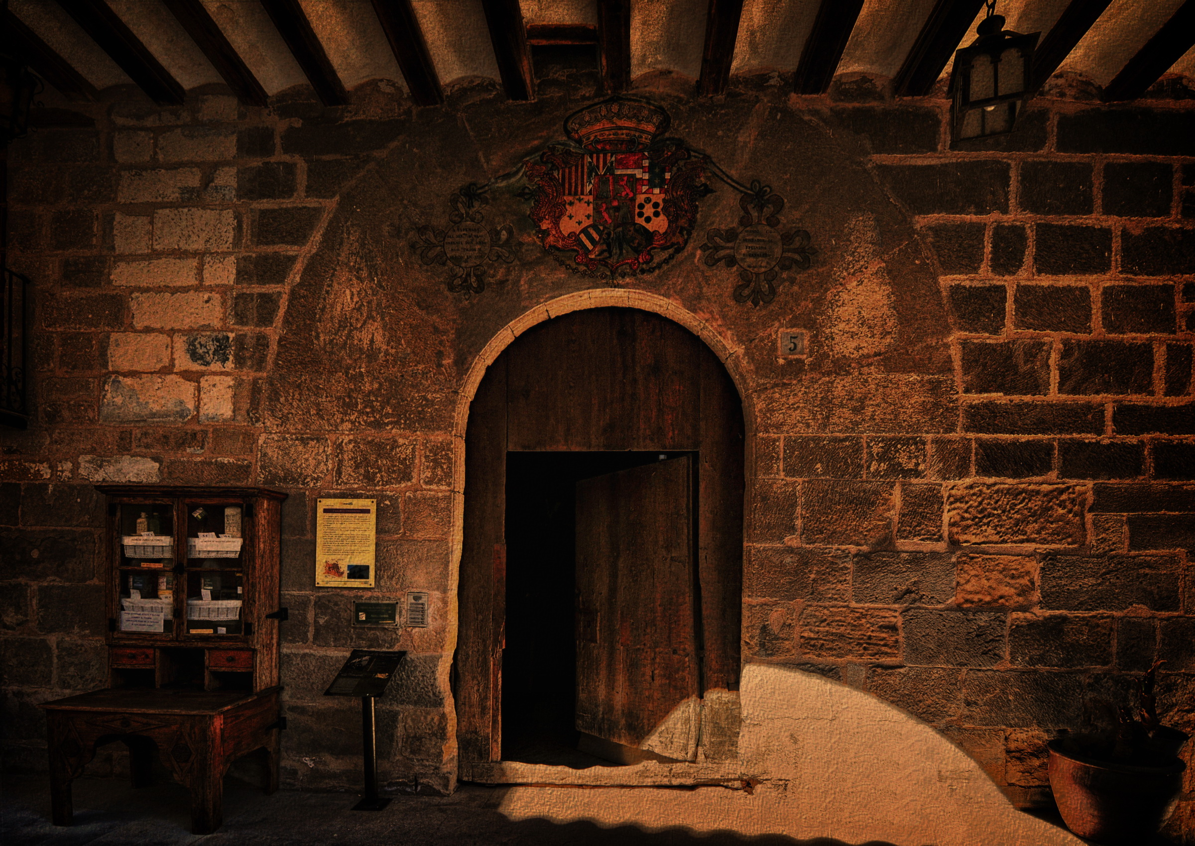 Este palacio, antigua residencia del comendador de la Orden de Calatrava, es uno de los edificios más representativos de la población de La Fresneda. Construido durante el siglo XVI, sufrió algunas reformas en los siglos posteriores hasta llegar a nuestros días en buenas condiciones. La construcción es completamente en sillería, roca caliza de la zona que le da esa ligera tonalidad amarilla. Edificio renacentista, conserva en su fachada algunos de los particulares de la arquitecturafachada del palacio civil aragonesa. El soportal o lonja en su parte inferior abierta por amplios arcos de medio punto sobre columnas jónicas; la galería de arquillos en la parte superior; o los balcones con una impresionante barandilla de hierro forjado en la planta intermedia. En la escalera de acceso a la planta superior se encontraba un relieve de la cruz de Calatrava, emblema de la orden militar que construyó el edificio y desde donde gobernó a las seis poblaciones que constituían la encomienda de La Fresneda.